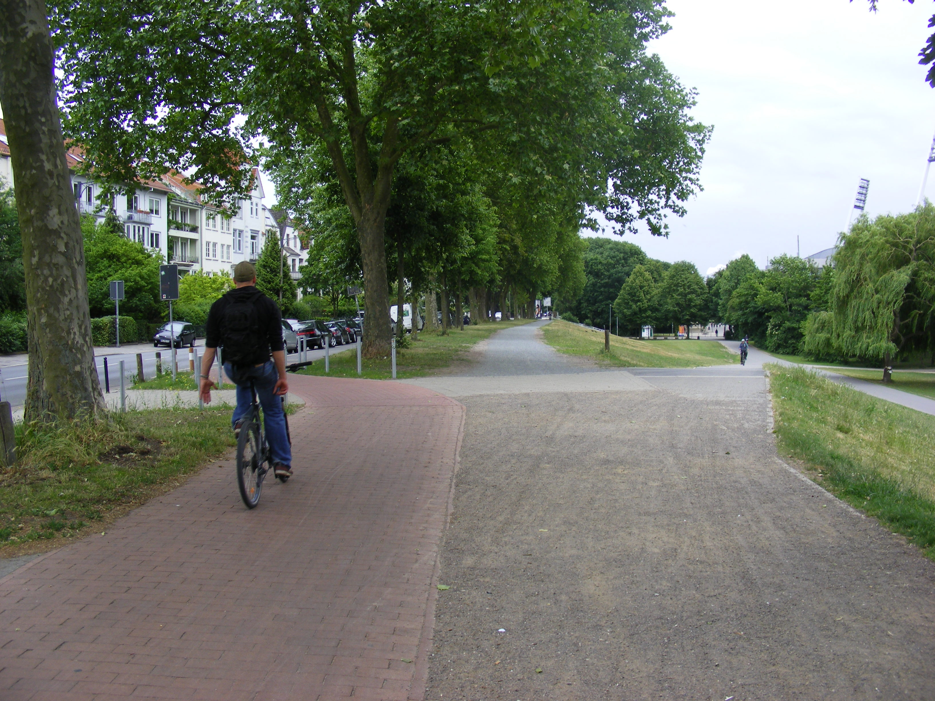 Radweg des Osterdeichs beim Café Ambiente, Fuß-und Fahrradrampe zum Vorplatz des Weserstadions